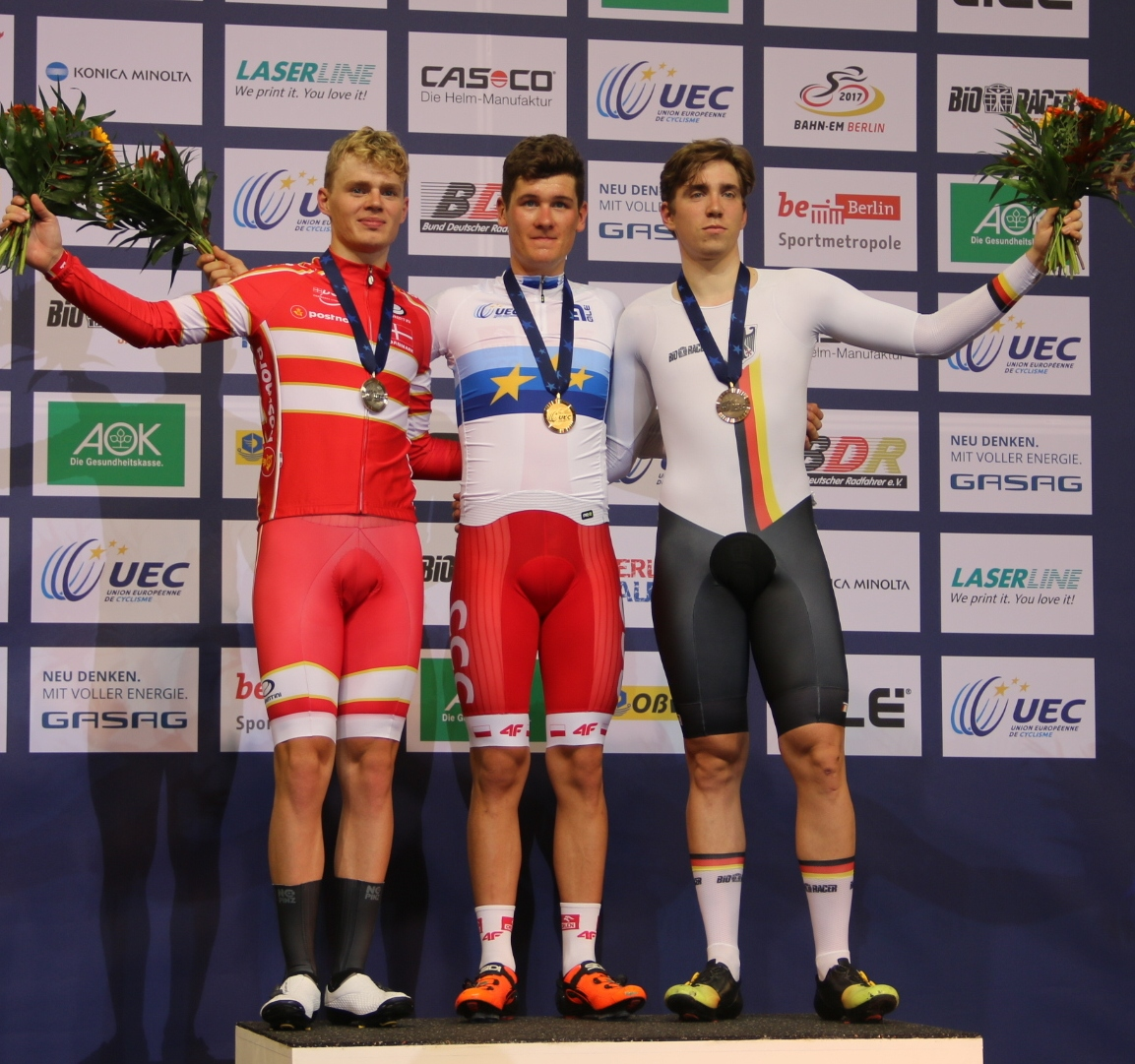 Podium Punktefahren, v.l.n.r.: Niklas Larsen, Alan Banaszek, Maximilian Beyer